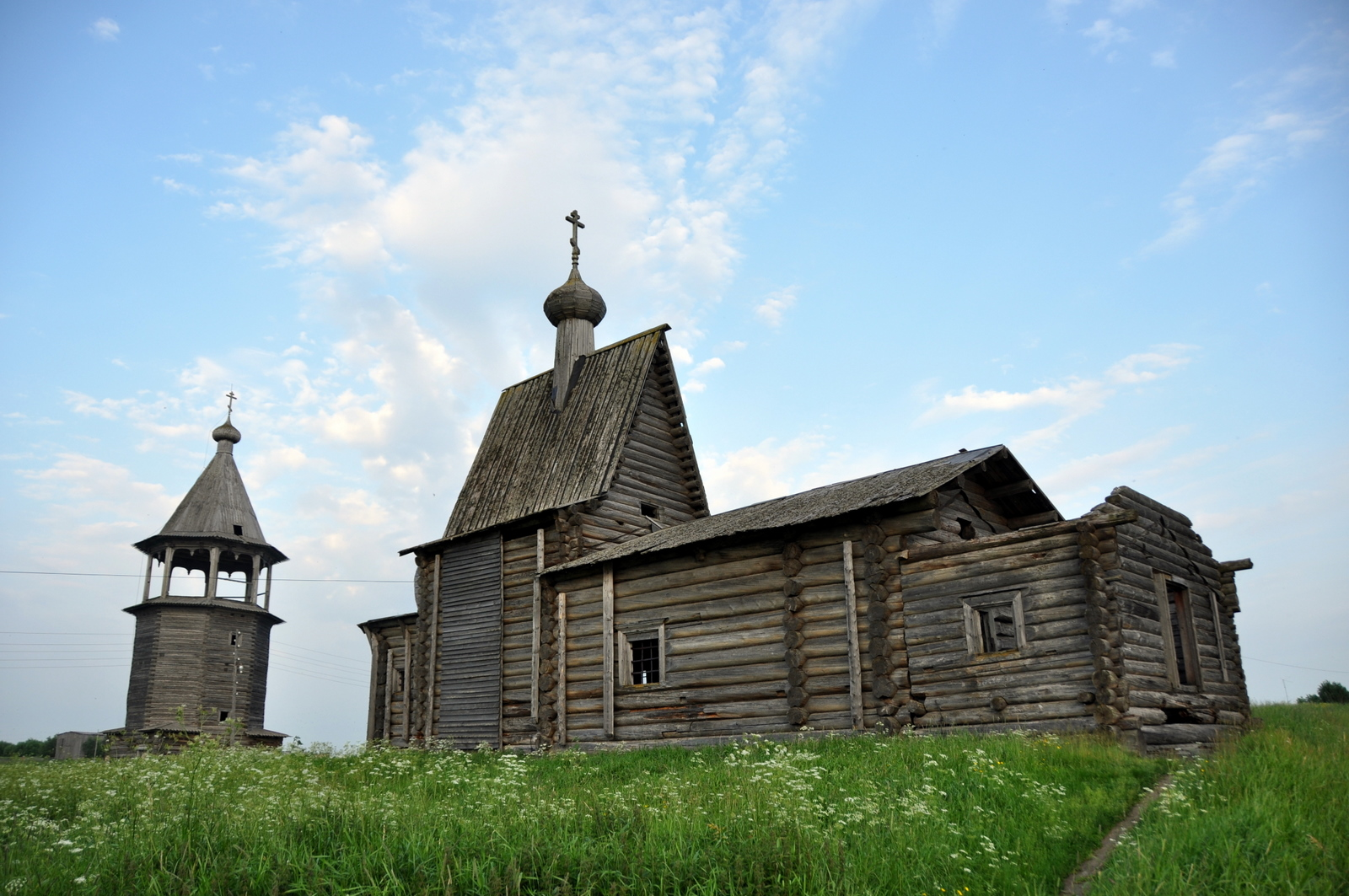 Ильинский погост: Чухчерьма, Холмогорский район, Архангельская область